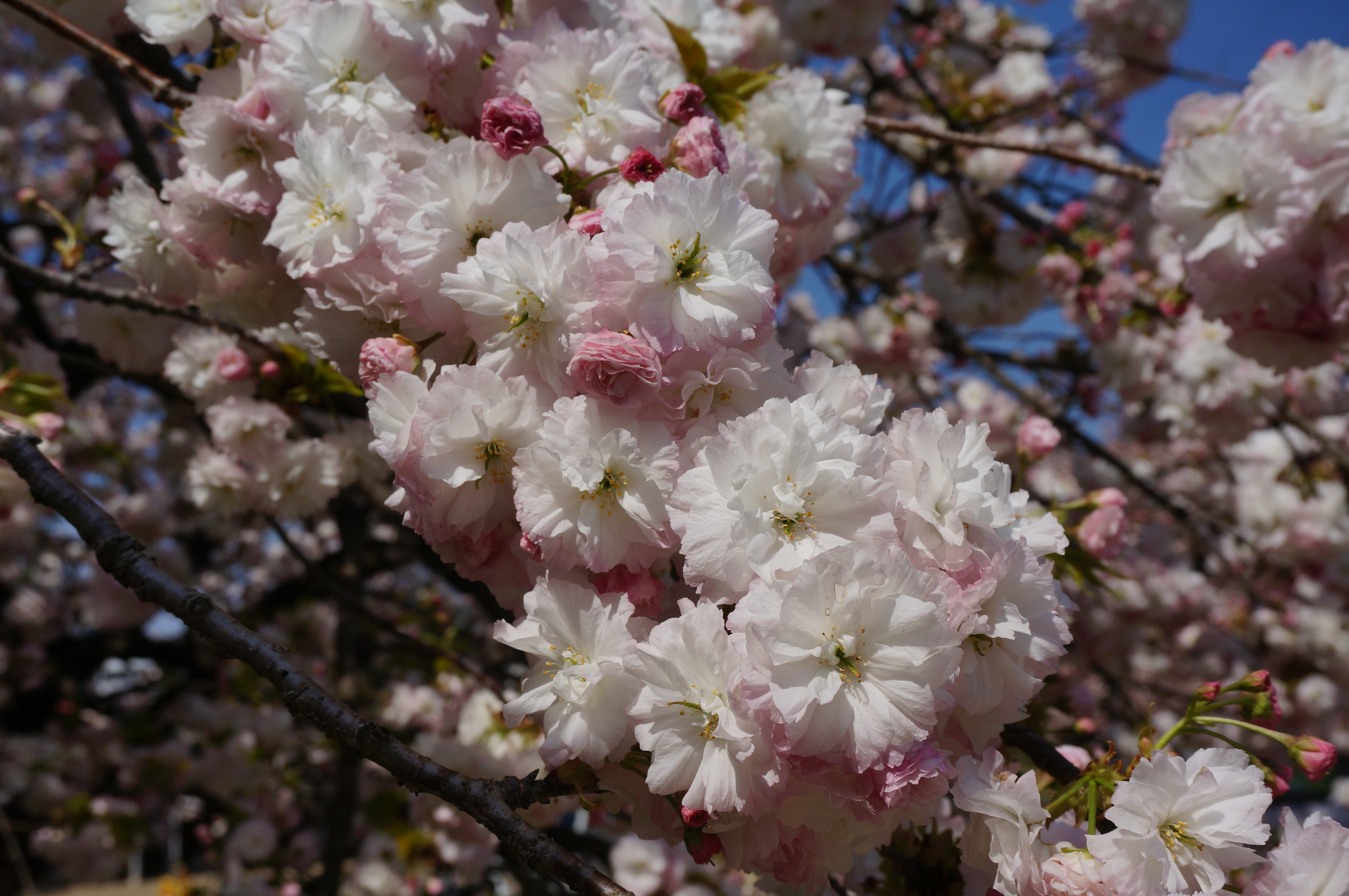 日本花の会結城農場さくら見本園にて